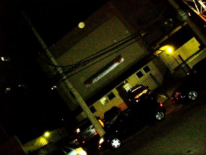 Sede da Transamérica Pop São Paulo e Transmissor digital Via Satélite